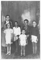 Giuseppina Giovanna Panzica (Caltanissetta, 1 agosto 1905 – Como, 15 febbraio 1976) madre di quattro figli e moglie del Finanziere in congedo Salvatore Luca, è stata una patriota italiana, che fu decorata di Medaglia d'oro al merito civile per il coraggio dimostrato nella seconda guerra mondiale nell'attività di espatrio dei cittadini di religione ebraica verso la Svizzera.